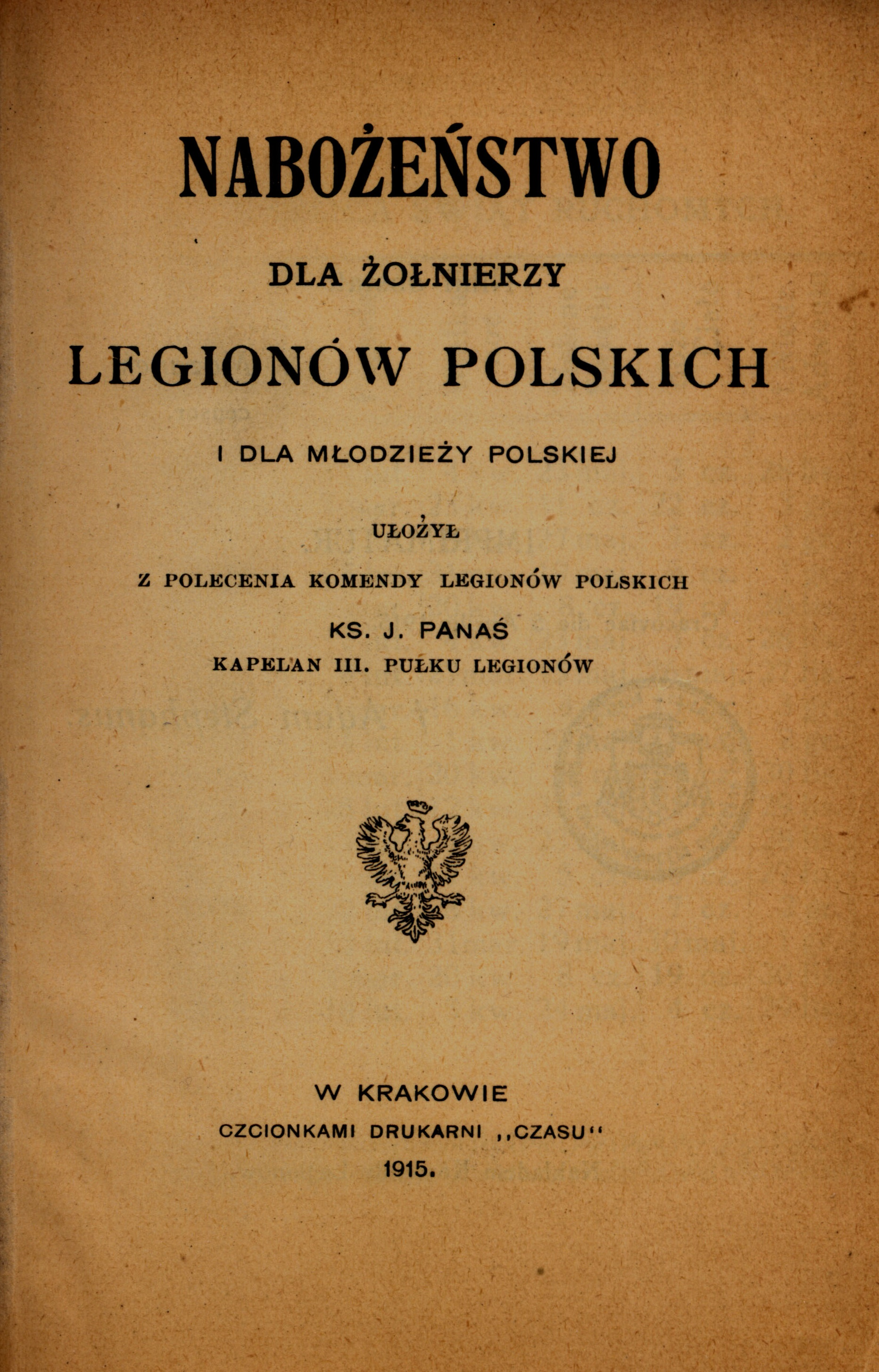 J. Panaś. Nabożeństwo dla żołnierzy Legionów Polskich i dla młodzieży polskiej. Kraków 1915.